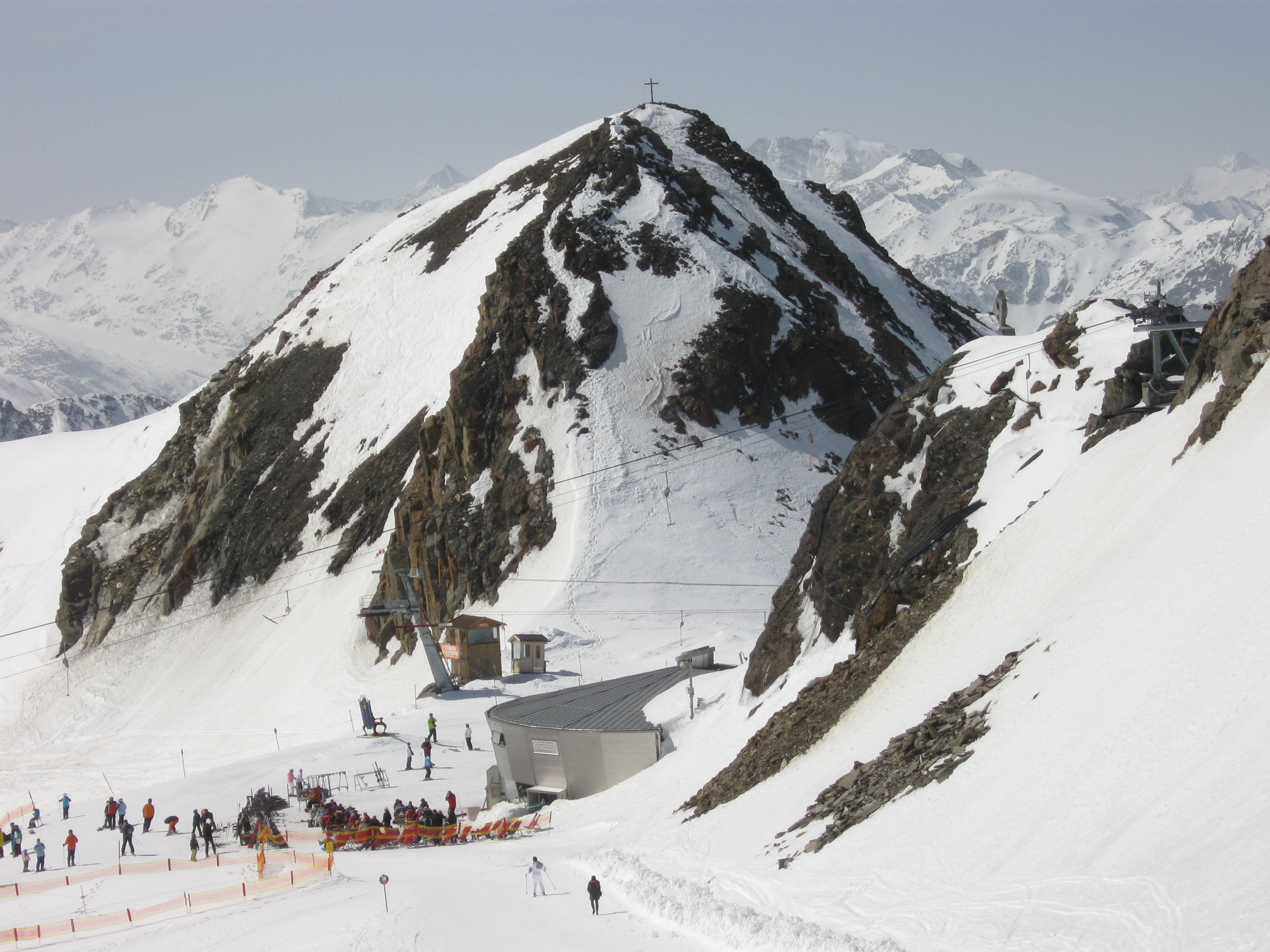 Das auf dem Stubaier Gletscher gelegene Bergrestaurant Jochdohle